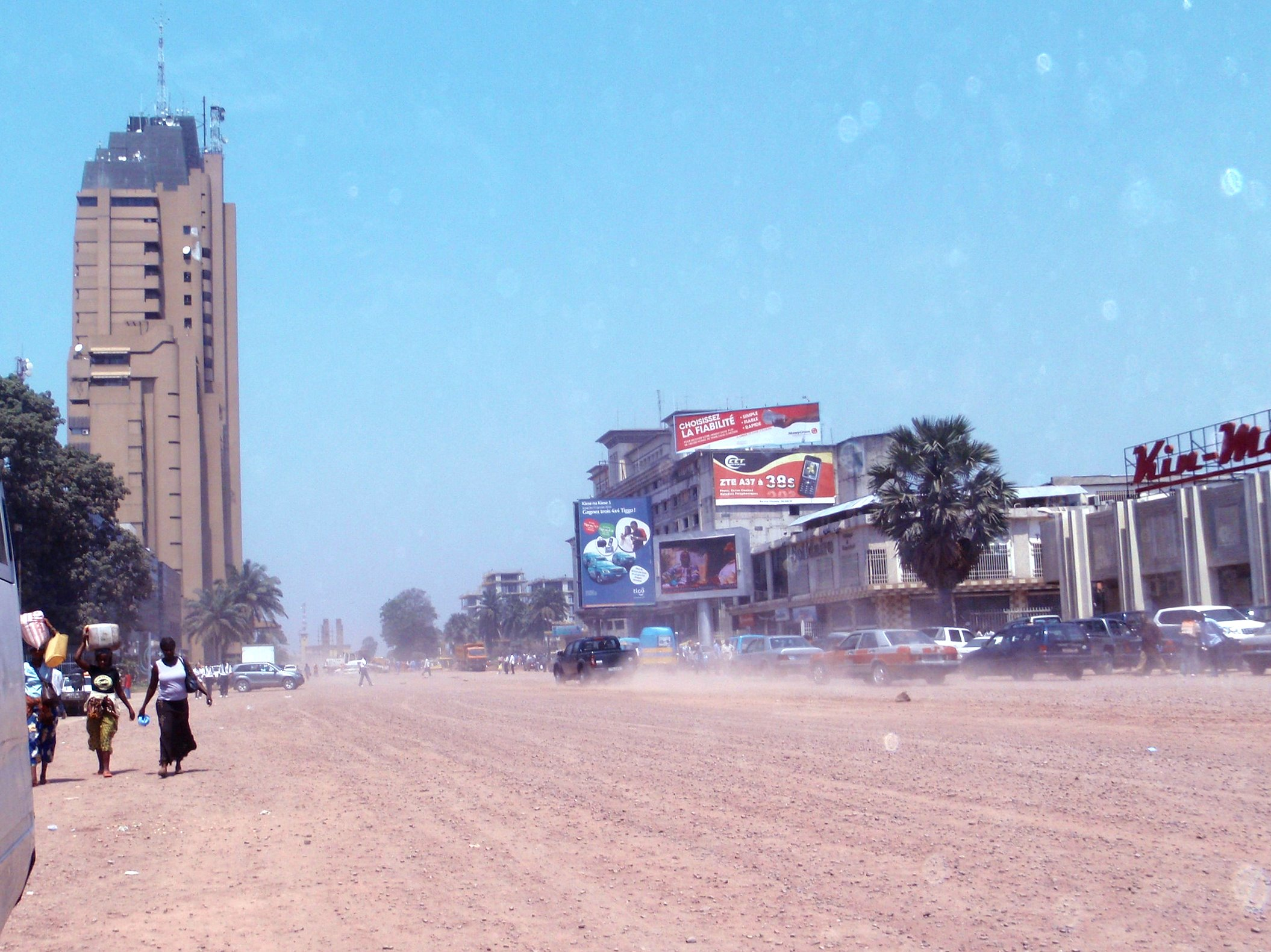 Boulevard du 30 juin, Kinshasa, 2010